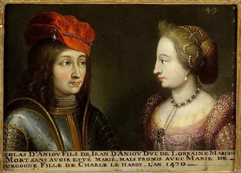 Portrait de Nicolas d'Anjou, duc de Lorraine de 1370 à 1373, et de sa fiancée Marie de Bourgogne. Ce tableau fait partie d'une suite d'une soixantaine de double-portraits représentant les ducs et duchesses de Lorraine ainsi que leurs ancêtres supposés. Musée des Offices, Florence (Inv. 1890, 642)